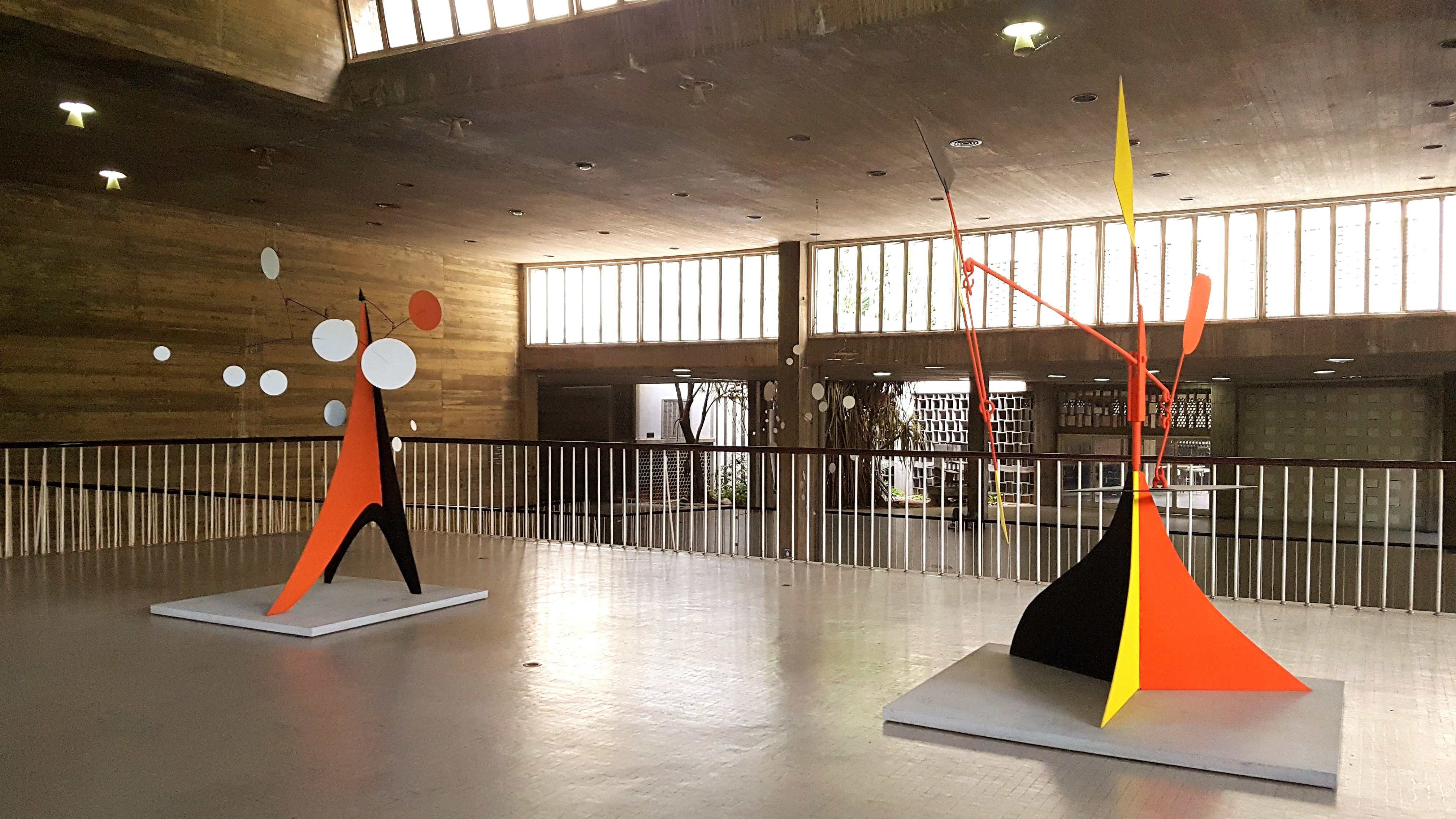 Facultad de Arquitectura y Urbanismo, Ciudad Universitaria de Caracas